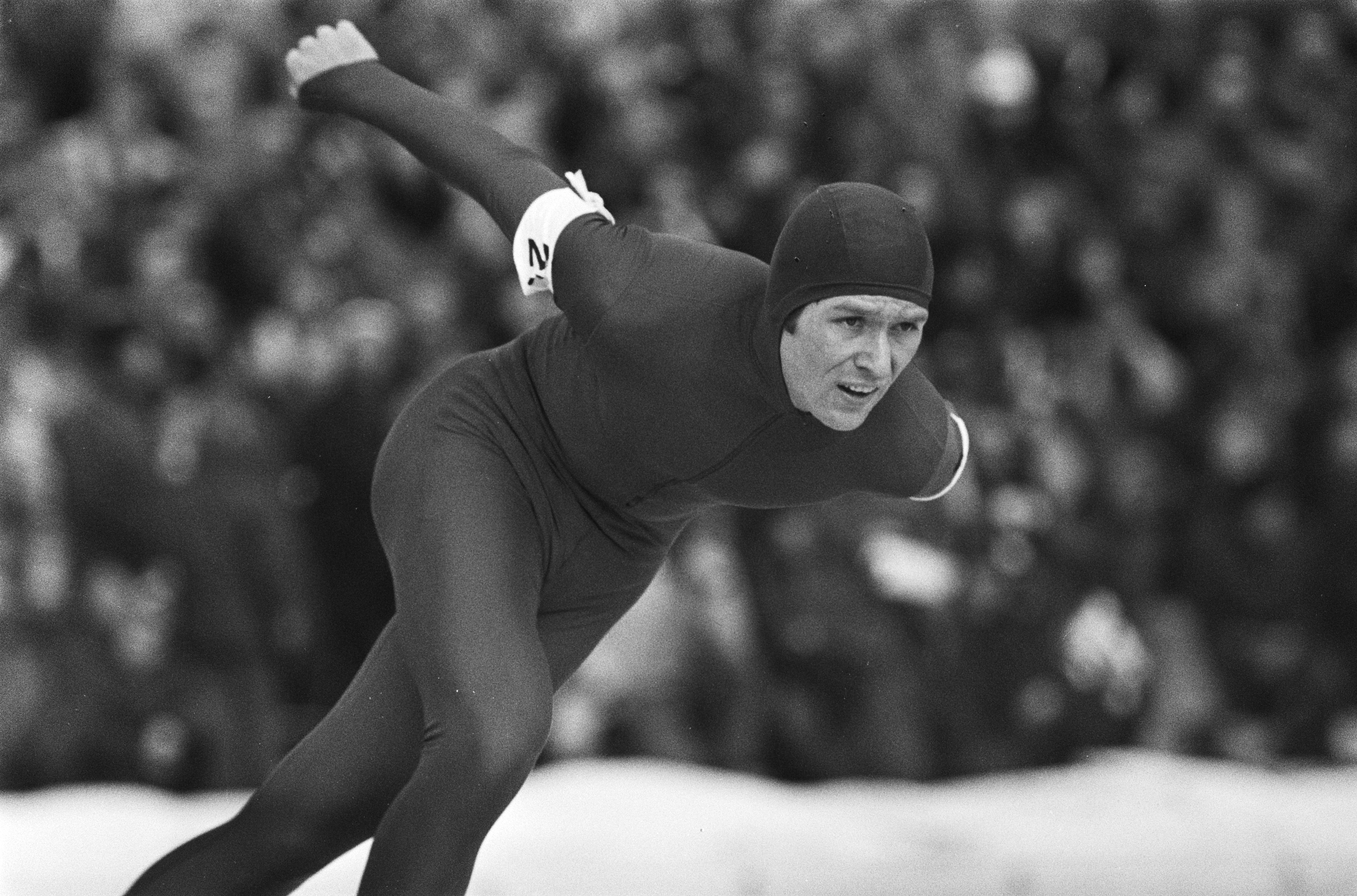 Collectie / Archief : Fotocollectie Anefo Reportage / Serie : [ onbekend ] Beschrijving : WK-schaatsen heren in Heerenveen; Stenshjemmet (Noorwegen tijdens 5.000 meter Datum : 12 februari 1977 Locatie : Friesland, Heerenveen, Noorwegen Trefwoorden : schaatsen, sport Fotograaf : Suyk, Koen / Anefo Auteursrechthebbende : Nationaal Archief Materiaalsoort : Negatief (zwart/wit) Nummer archiefinventaris : bekijk toegang 2.24.01.05 Bestanddeelnummer : 929-0250